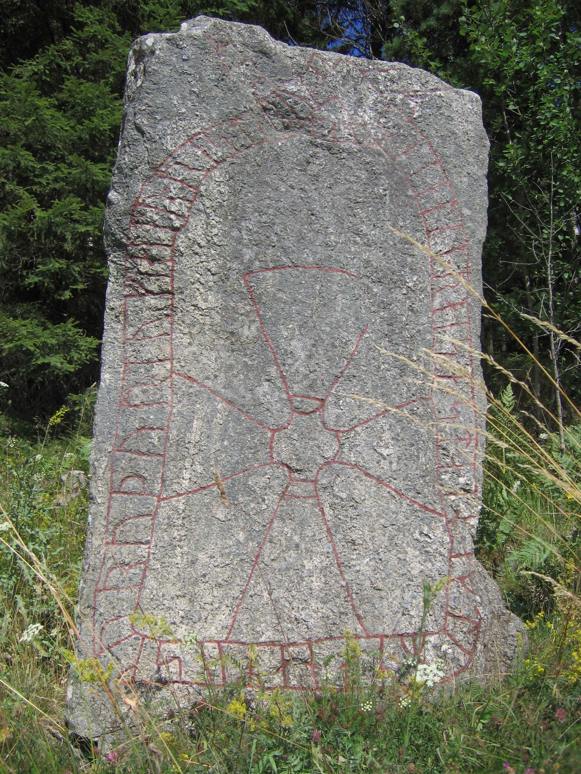 Runestone Sö 374